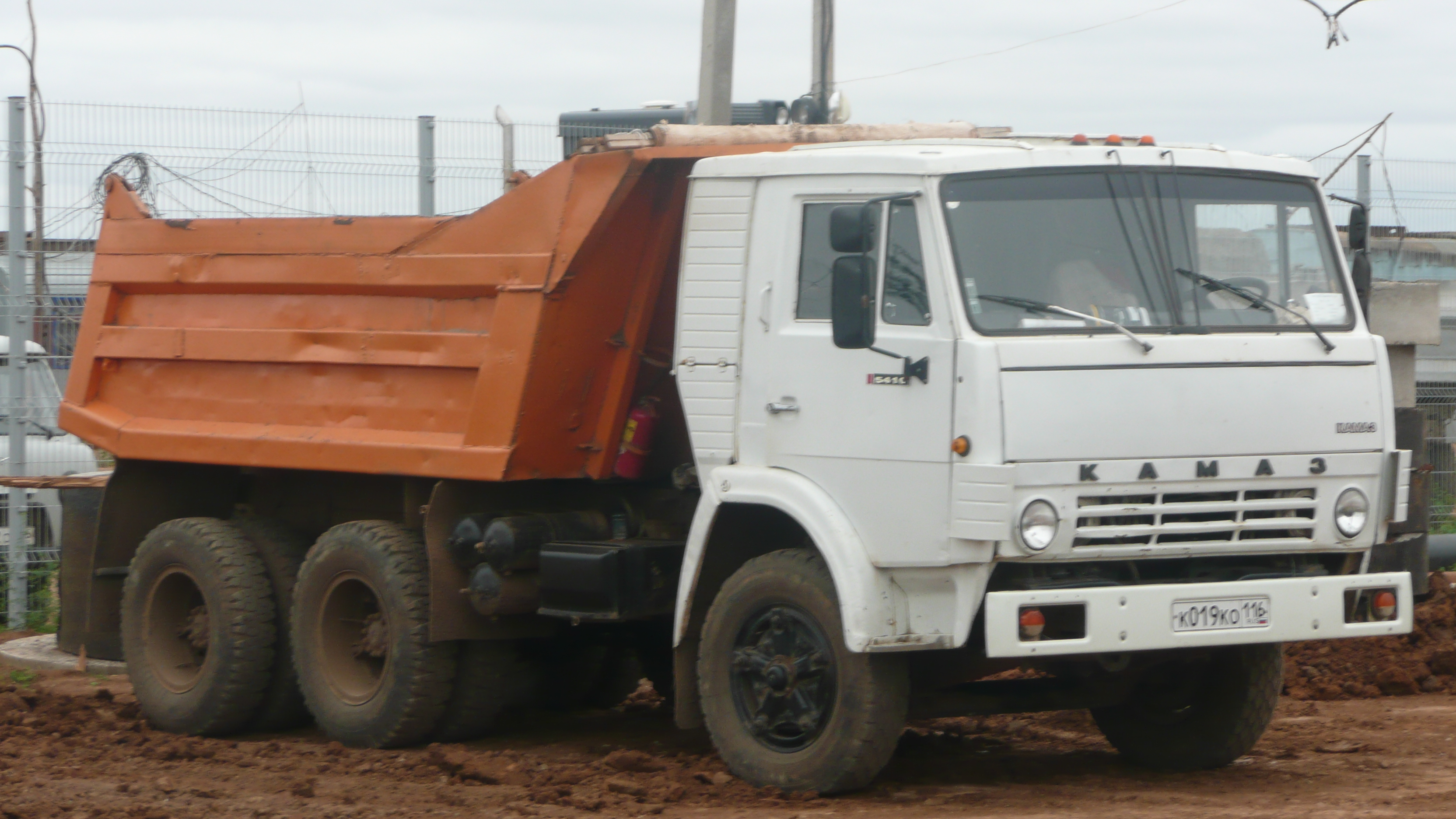 Kamaz vehicle 5410